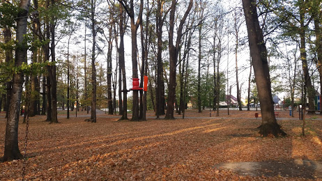 Fotografia z Parkiem Miejskim w Bielawie. Na zdjęciu widnieje część parku linowego, a w oddali staw